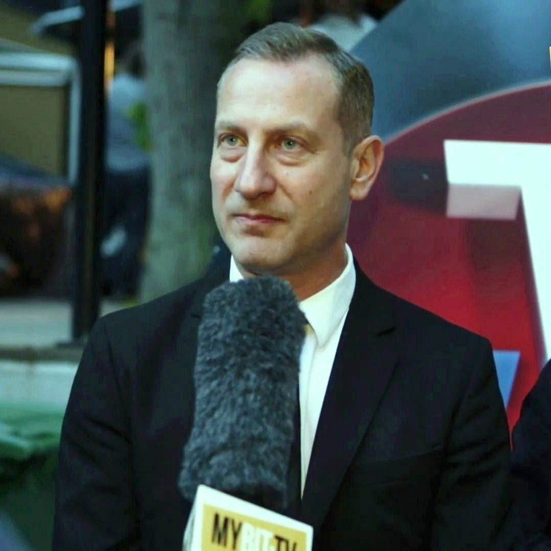 Wojciech Jagielski, dziennikarz, muzyk i lekarz.